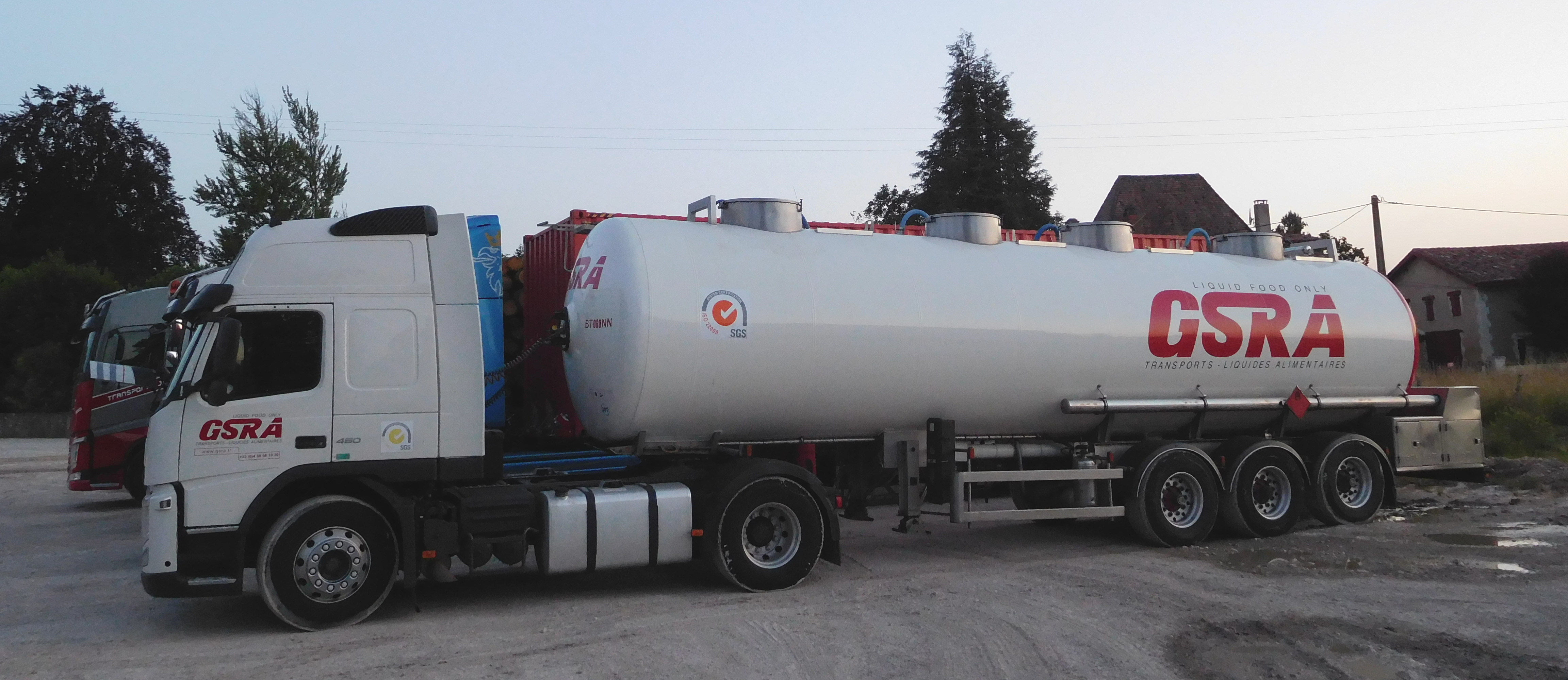 Transport (uniquement) de liquides alimentaires, par camion-citerne semi-remorque Volvo de 450 ch de l'entreprise GSRA (Grand Sud Route Alimentaire), certifié ISO 22000 par SGS ; Saint-Front-de-Pradoux, Dordogne, France.